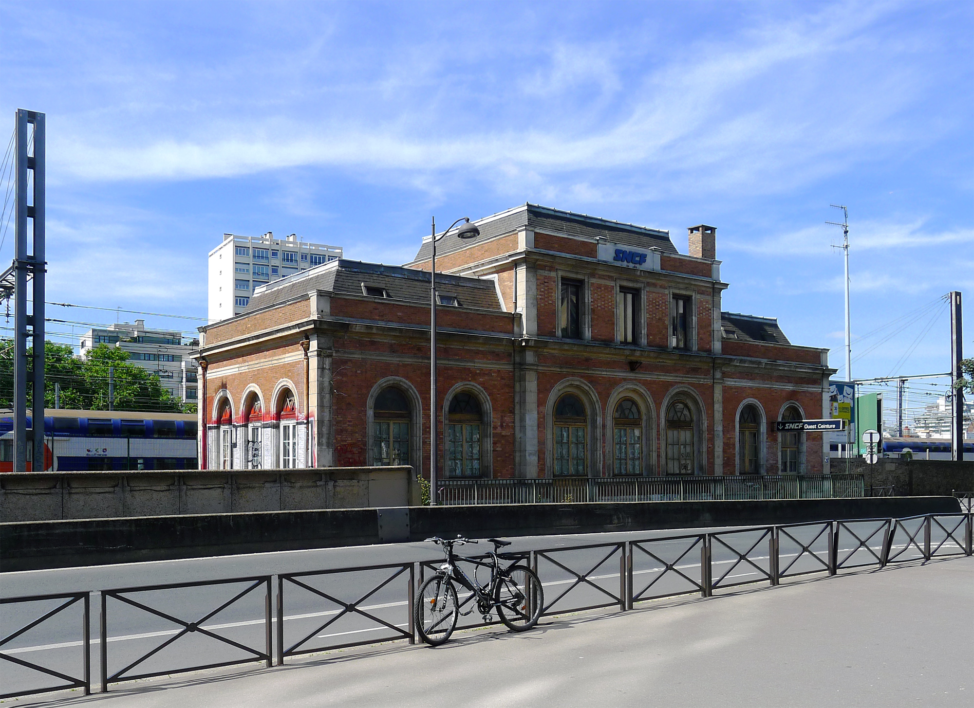 Ancienne gare d'Ouest-ceinture au n°232 rue Vercingétorix - Paris XIV